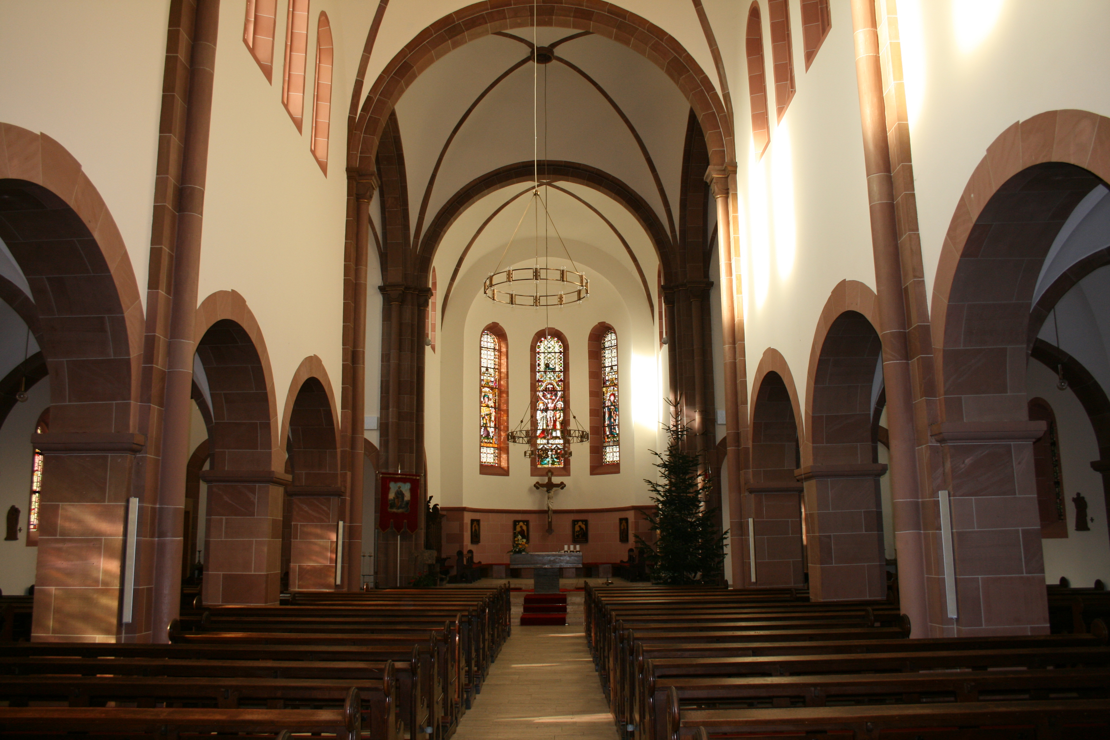 Kirche Selters-Eisenbach, Innenansicht